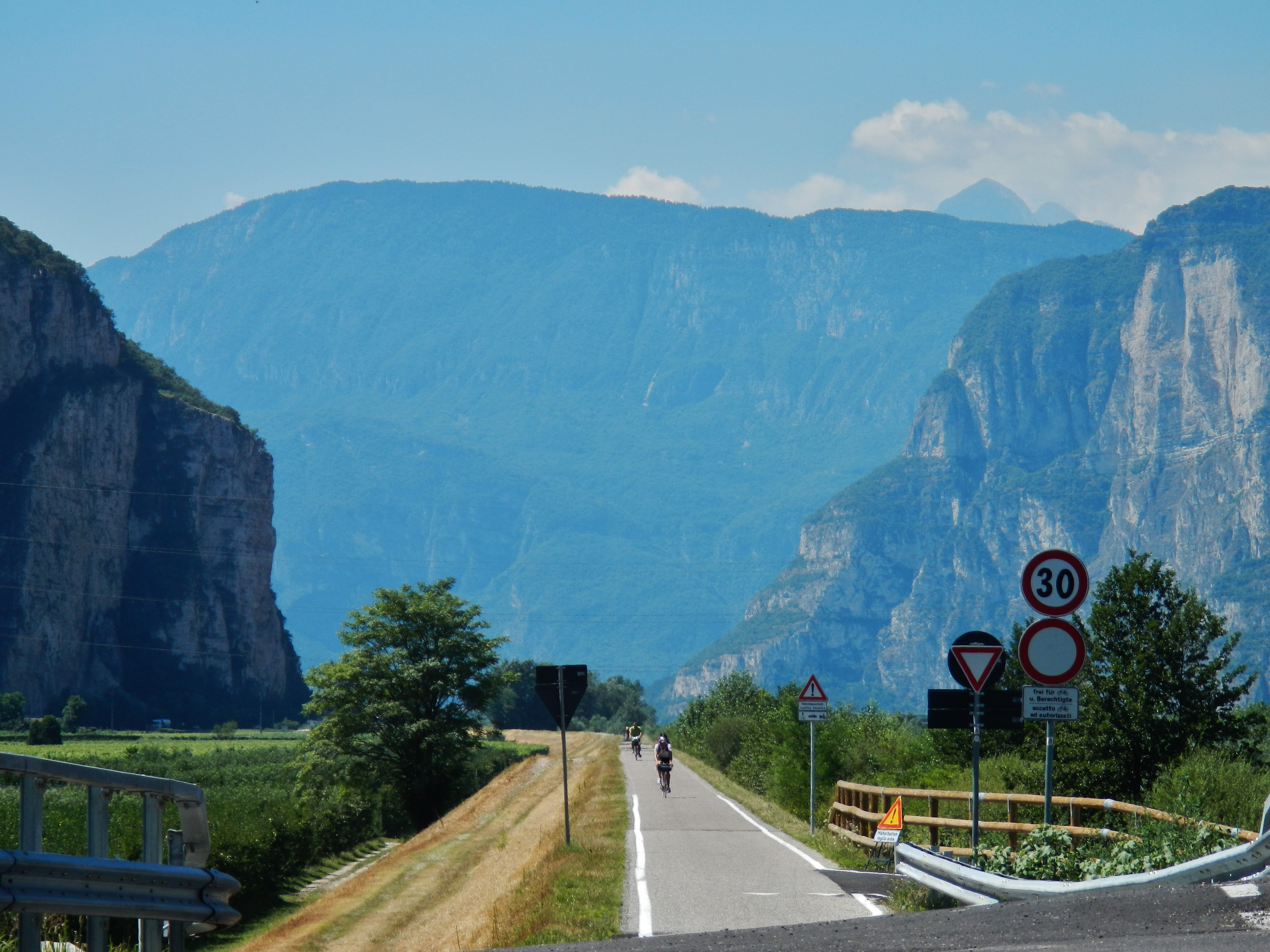 Radweg im Etschtal Valle dell'Adige,Val d'Adige, Richtung Trento, pista ciclabile